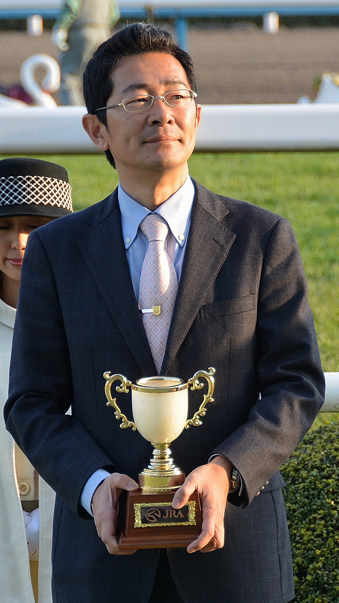 2015年1月5日に京都競馬場の第11競走「万葉ステークス」で、勝利したステラウィンドの管理調教師として表彰されている尾関知人氏を、観客席から撮影。